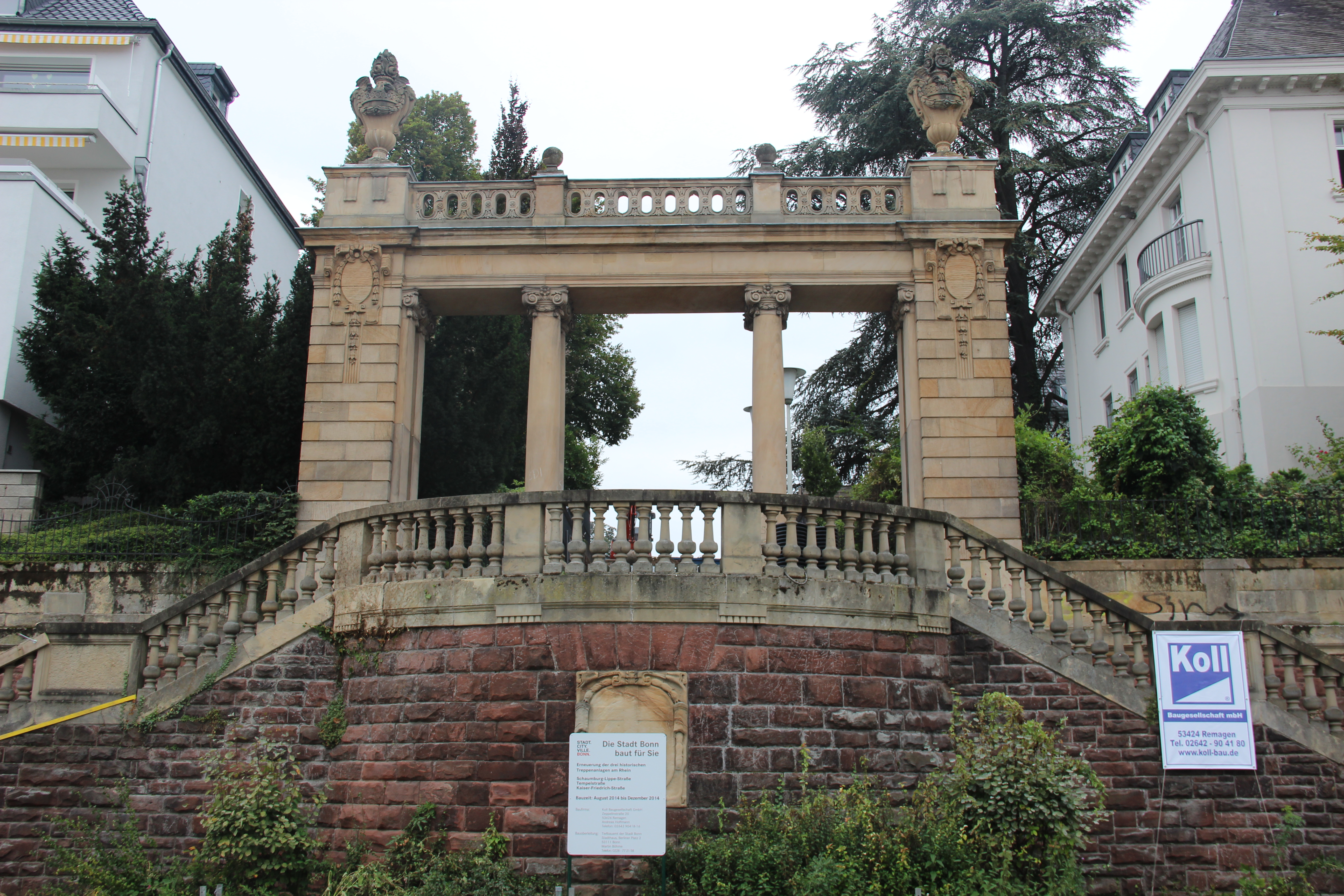 Der Treppenaufgang Rathenauufer/Schaumburg-Lippe-Straße in Bonn, Ortsteil Südstadt: Ansicht von der Rheinseite während der Restaurationsarbeiten 2014